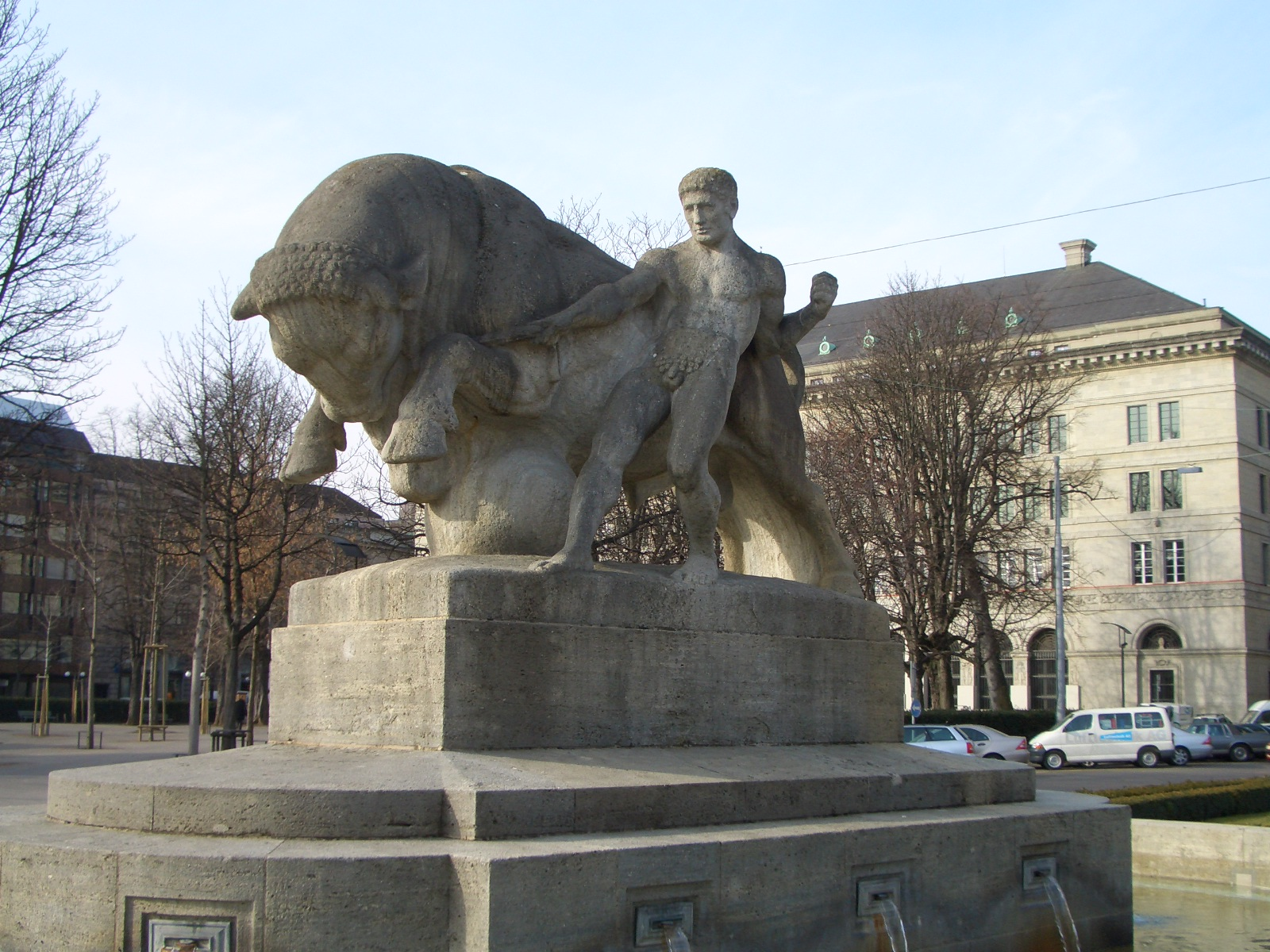 Arnold-Geiser-Brunnen. Erbaut von Jakob Brüllmann im Jahr 1910, eingeweiht am 21.10.1911 auf dem Bürkliplatz in Zürich (Schweiz) zu Ehren von Arnold Geiser (1844-1909), Stadtbaumeister von 1876-1907. "Der Stadt Zürich gewidmet Arnold Geiser Stadtbaumeister von 1875-1907."